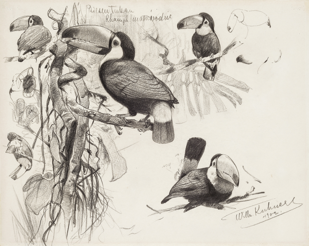 Wilhelm Kuhnert: Riesentukan. Bleistift auf Papier, 24,5 x 30,5 cm, Rechts unten signiert und datiert, sowie in deutscher und lateinischer Sprache bezeichnet